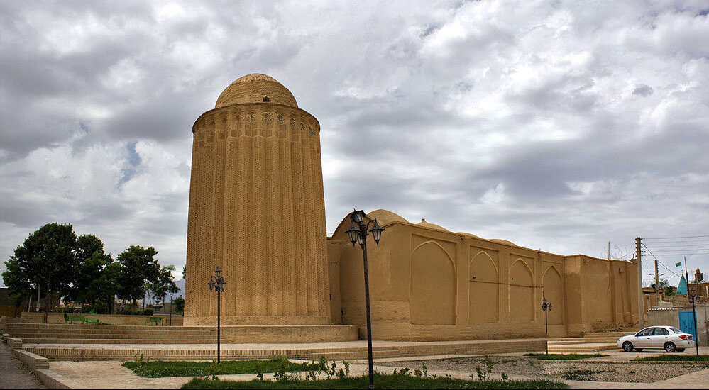 برج کاشانه بسطام